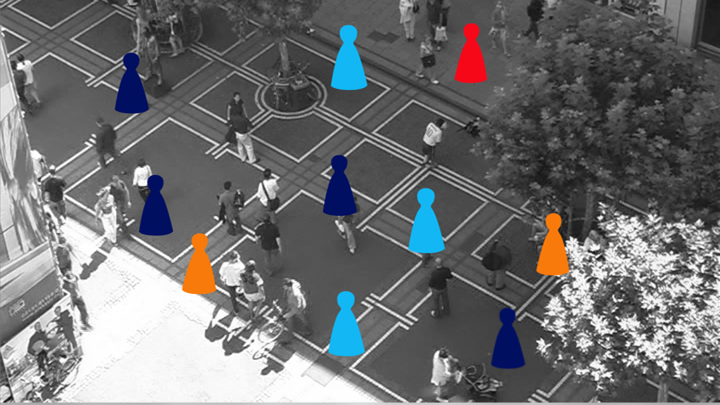 Quelle des Einkommens in Deutschland